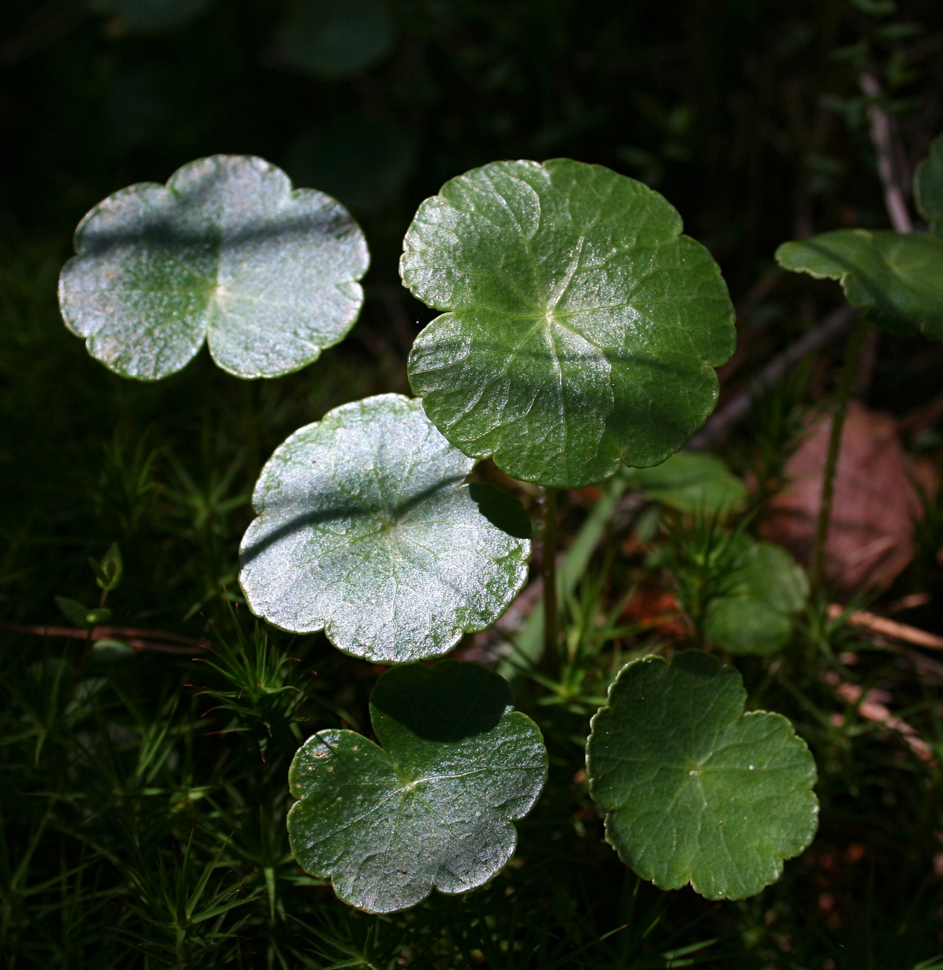 Park Narodowy Bory Tucholskie, wąkrota zwyczajna